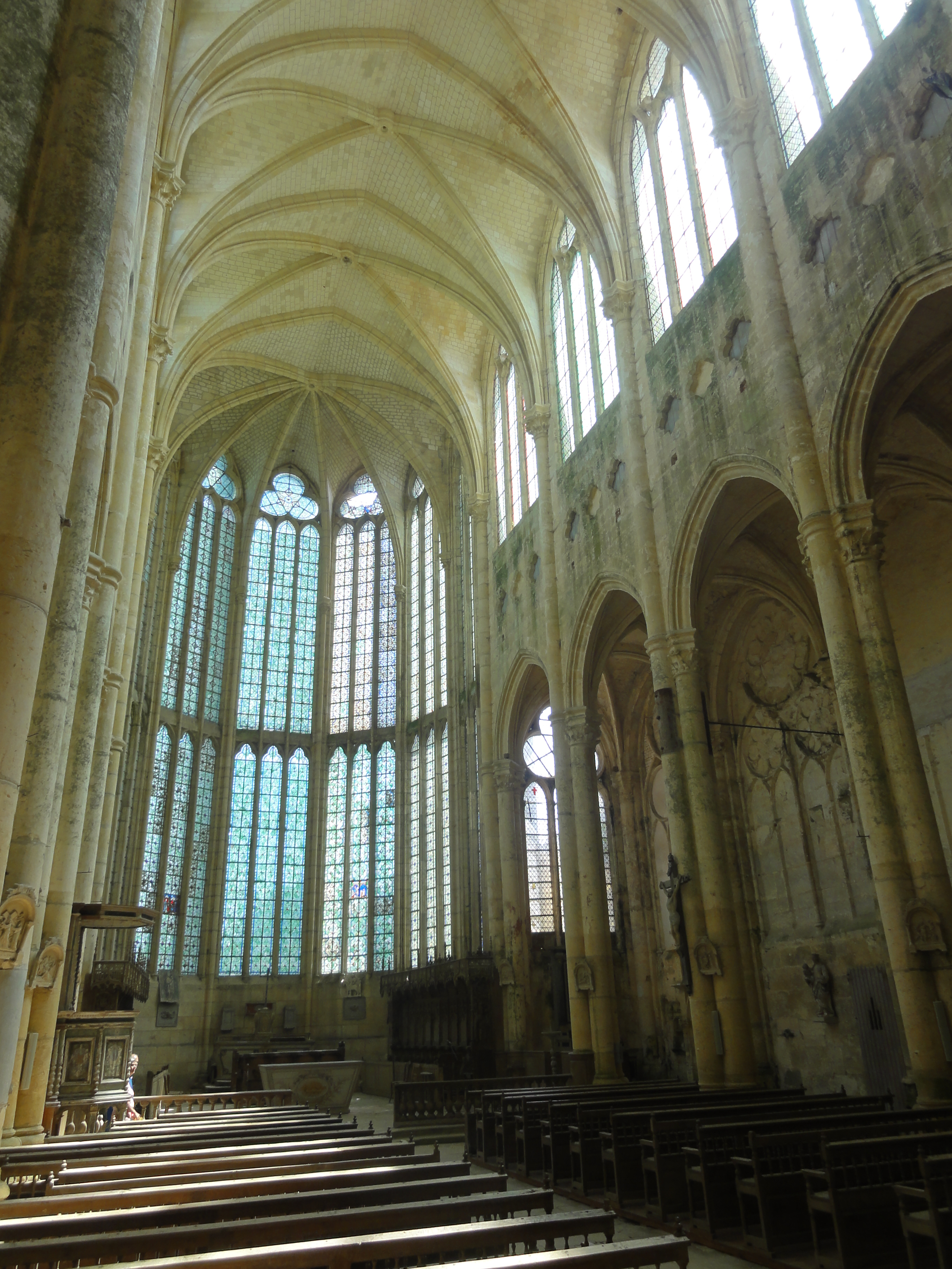 Intérieur, côté sud.